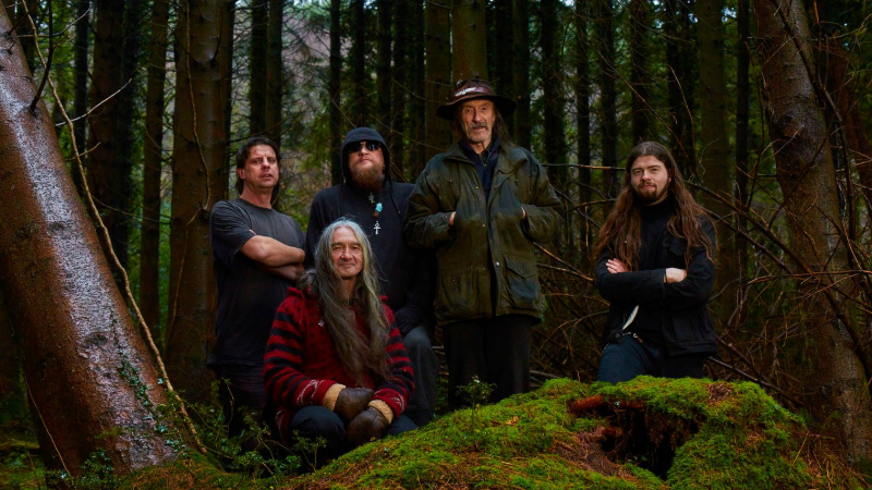 Hawkwind на момент выпуска нового альбома Into The Woods, 2017.